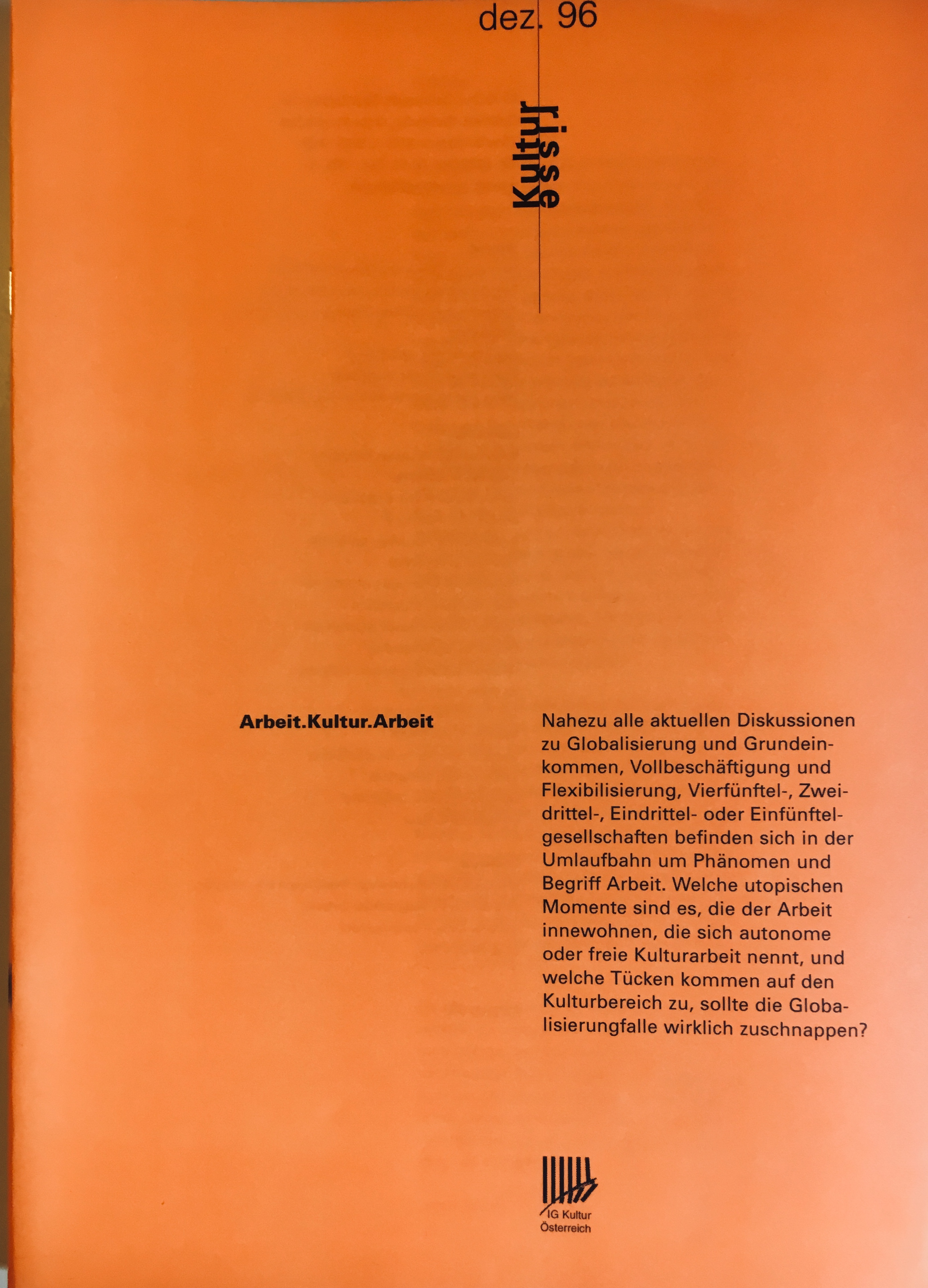 Cover der Kulturrisse, Magazin der IG Kultur, Ausgabe Dezember 1996